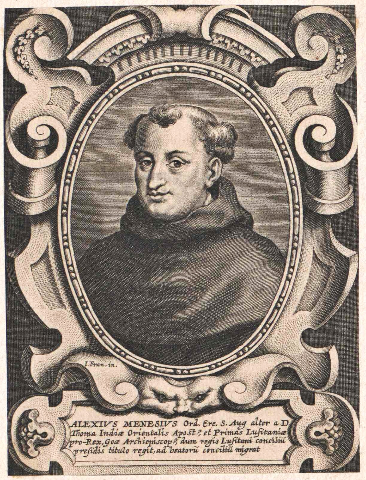 Aleixo de Menezes (1559-1617), Erzbischof von Goa, portugiesischer Vizekönig von Indien